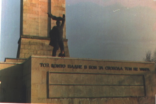 Паметникът през 80те